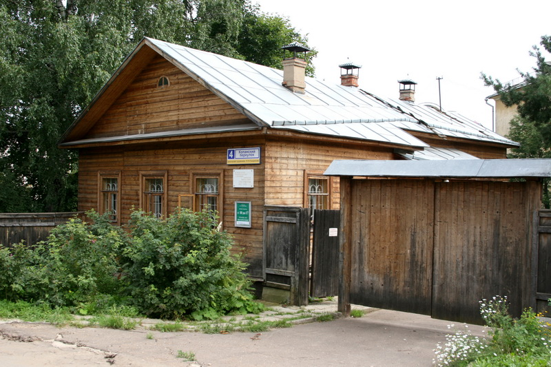 Музей-усадьба художника Н. Н. Хохрякова - филиал Вятского художественного музея